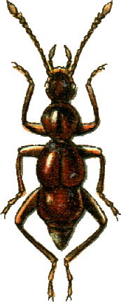 This file has been extracted from another file: Jacobs12.jpg